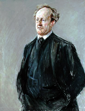 Gemälde Gerhart Hauptmanns von Max Liebermann († 1935) im Jahr 1912 - Das Jahr in dem Gerhart Hauptmann den Nobelpreis erhielt